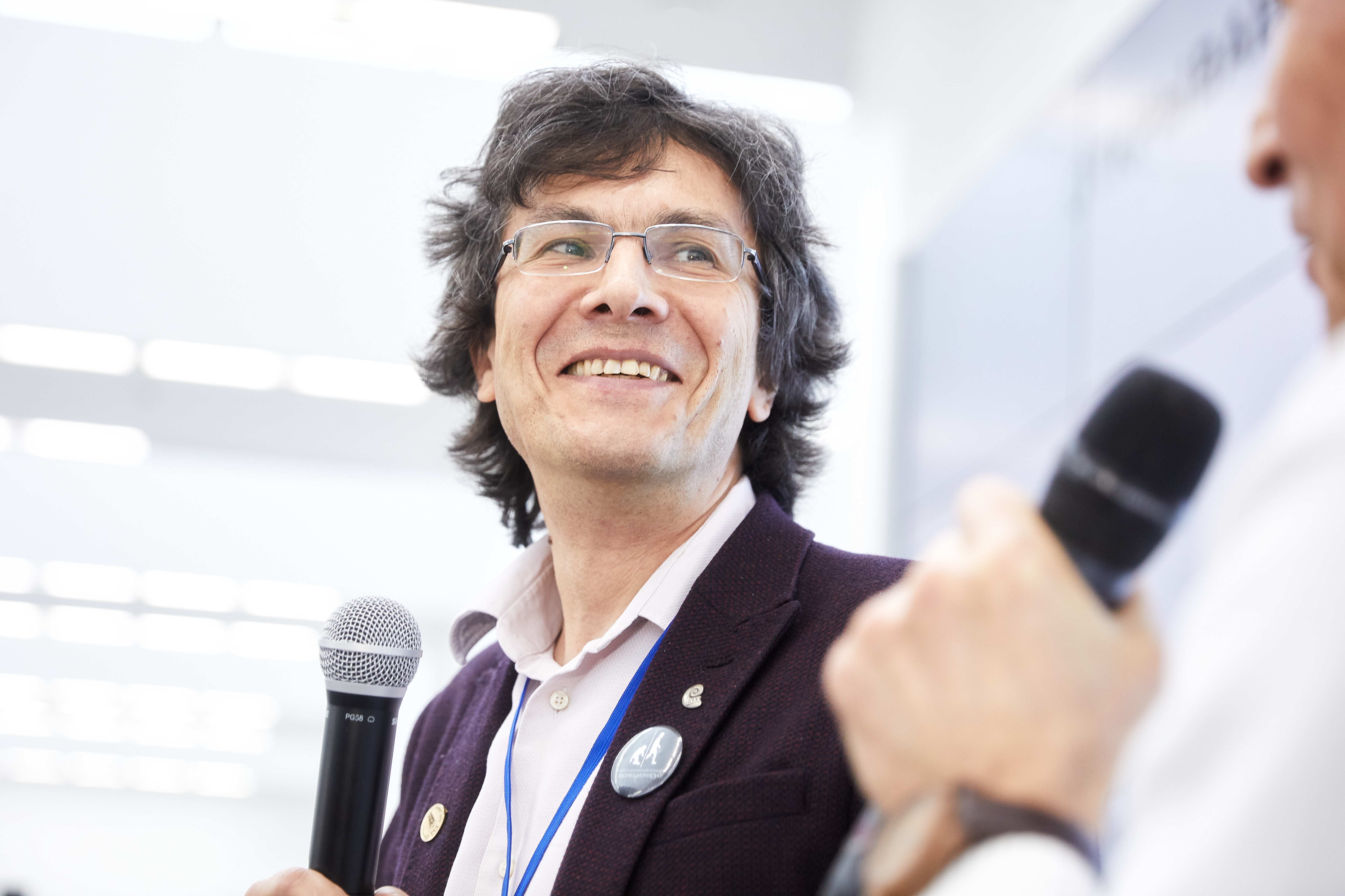 Александр Марков, д.б.н., профессор РАН, зав. кафедрой биологической эволюции биологического факультета МГУ, ведущий научный сотрудник Палеонтологического института РАН. Публикация «мини-набора макси-знаний» — наиболее важных темы современной научной картины мира на церемонии «Открываем чёрный ящик». Всенаучный форум 2020, 16 февраля 2020 года